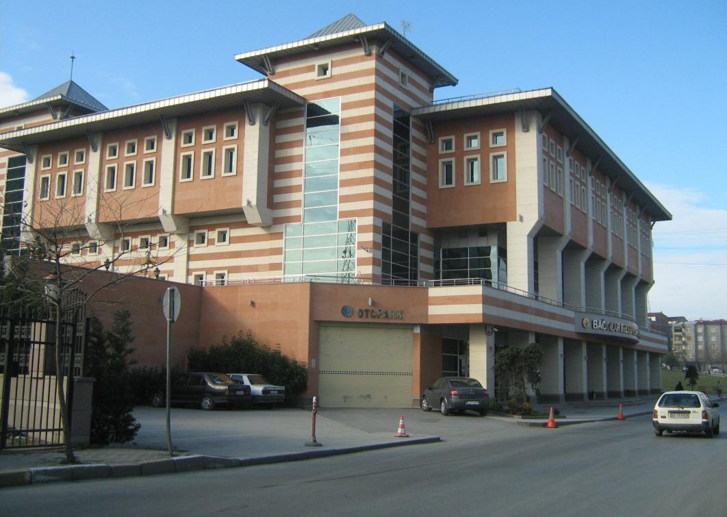 Fotoğraflar tarafımdan çekilmiştir.